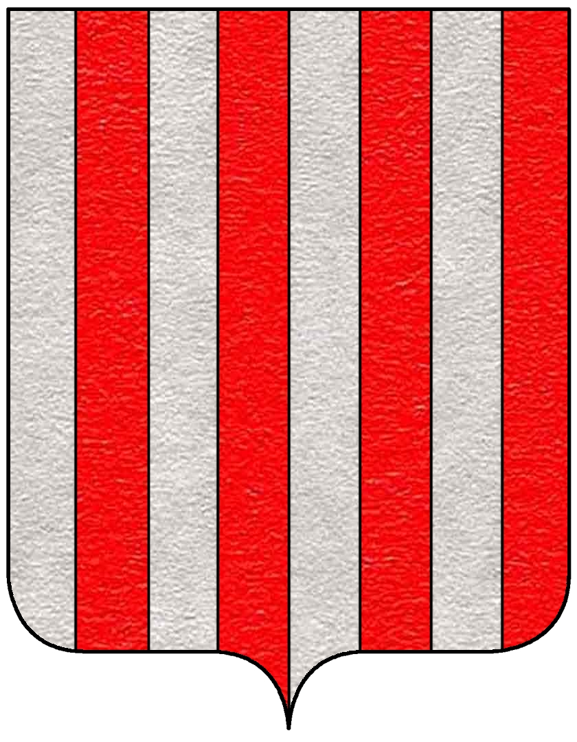 Stemma della famiglia Grimani, appartenente al patriziato di Venezia.